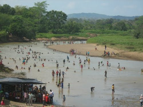 Rio San Pedro en su era de apogeo